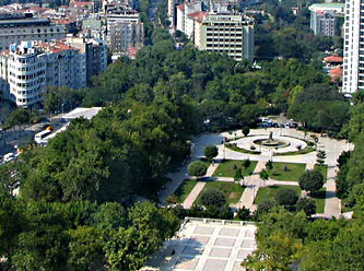 Vista del parque Taksim Gezi, Estambul, Turquía.